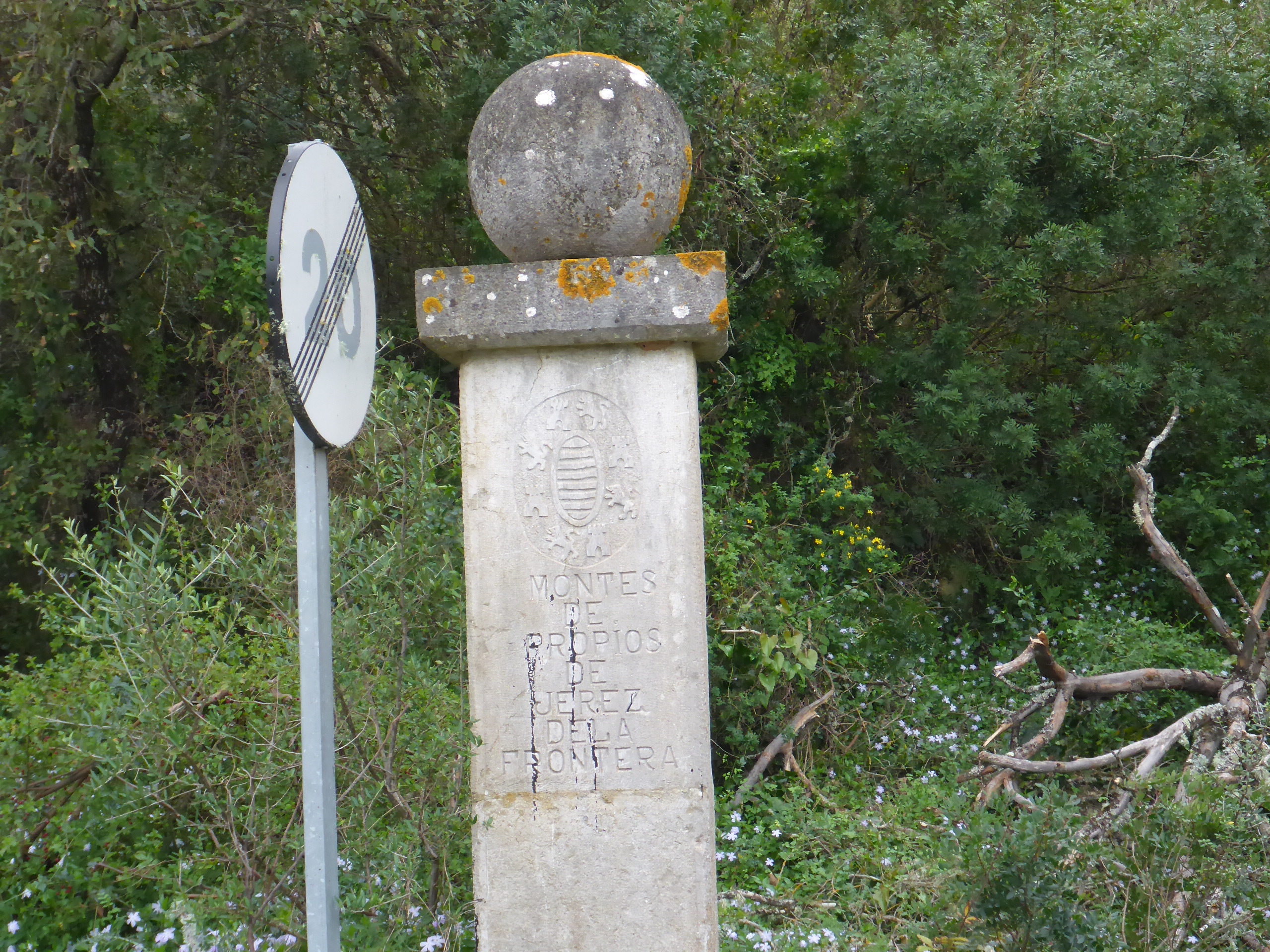 Poblado y Pantano de Los Hurones (provincia de Cádia, España)